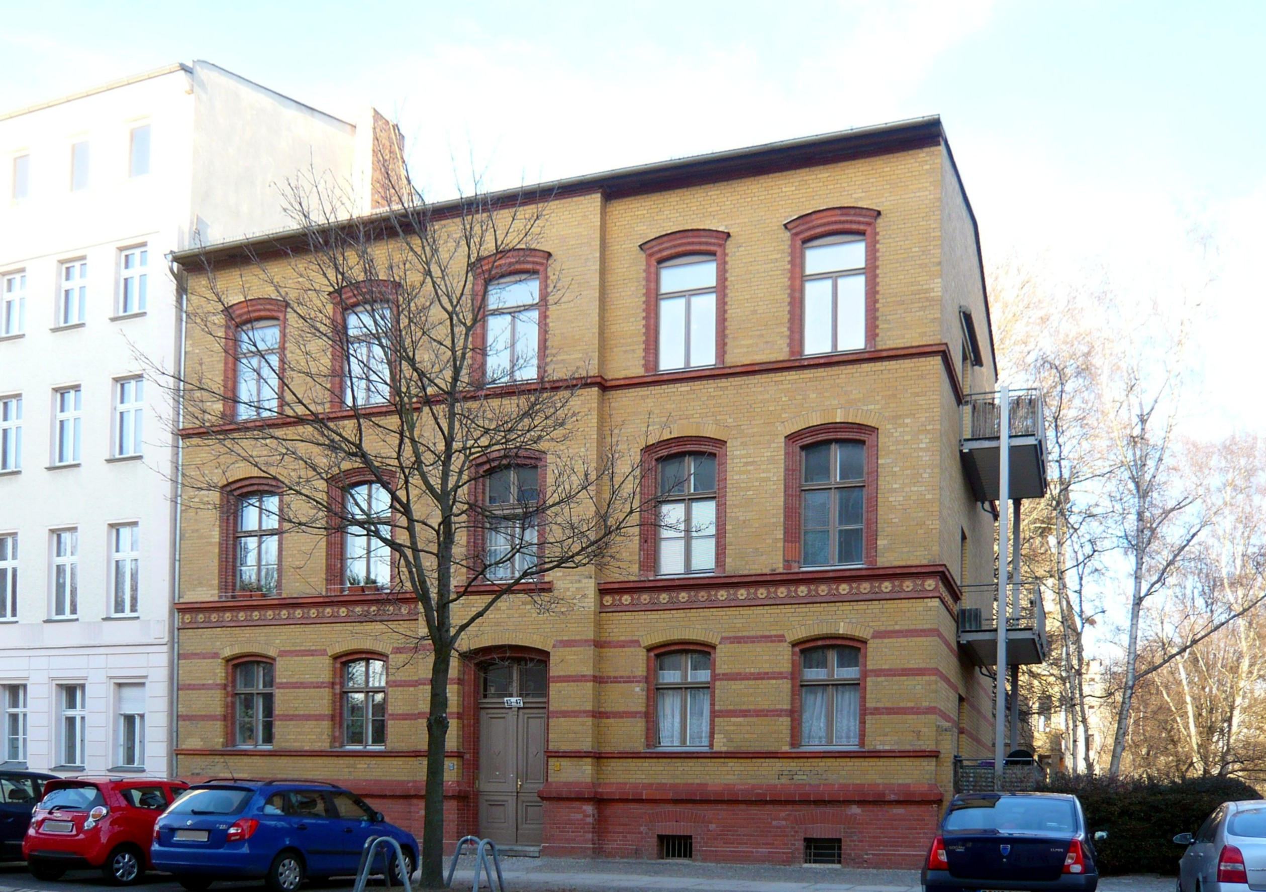 Berlin-Friedrichshain, Marchlewskistraße, im mittleren Bereich: eh. Rektorenwohnhaus